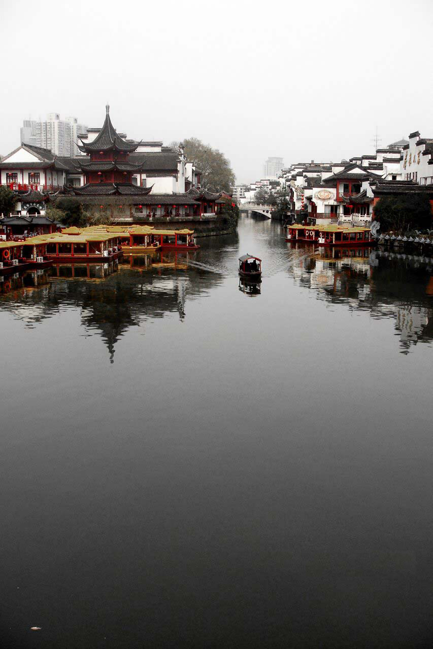 从夫子庙来燕桥看秦淮河